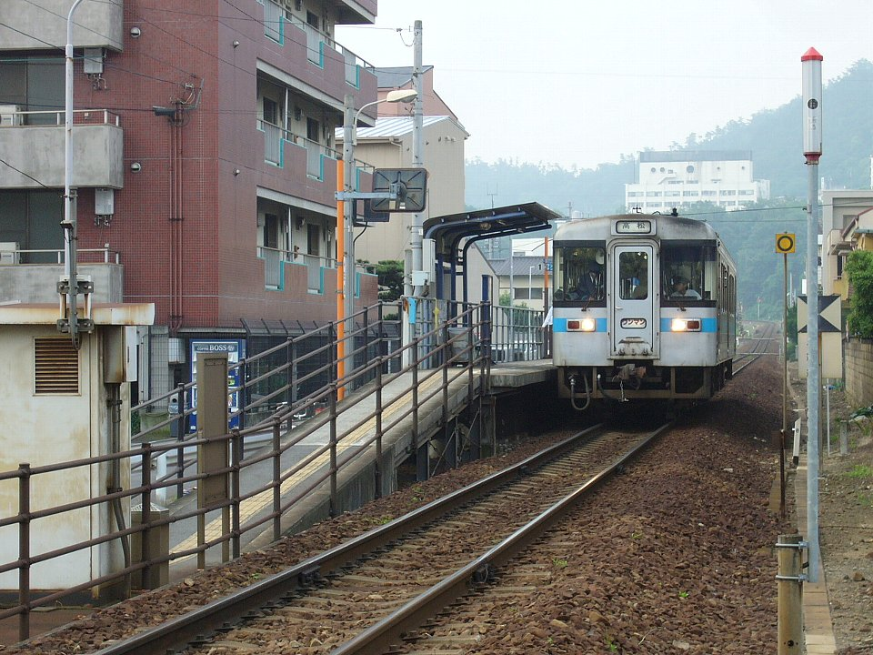 JR四国昭和町駅に停車中の1000形